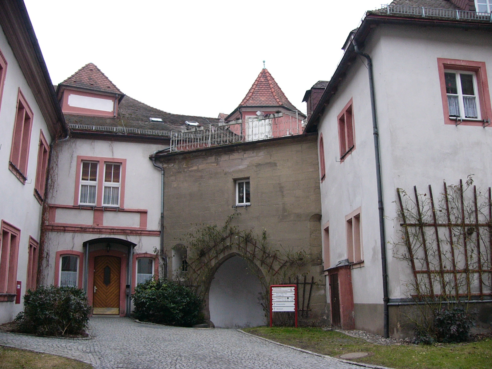 Unregelmäßiger Verlauf des Innenhofs im Kloster Himmelkron